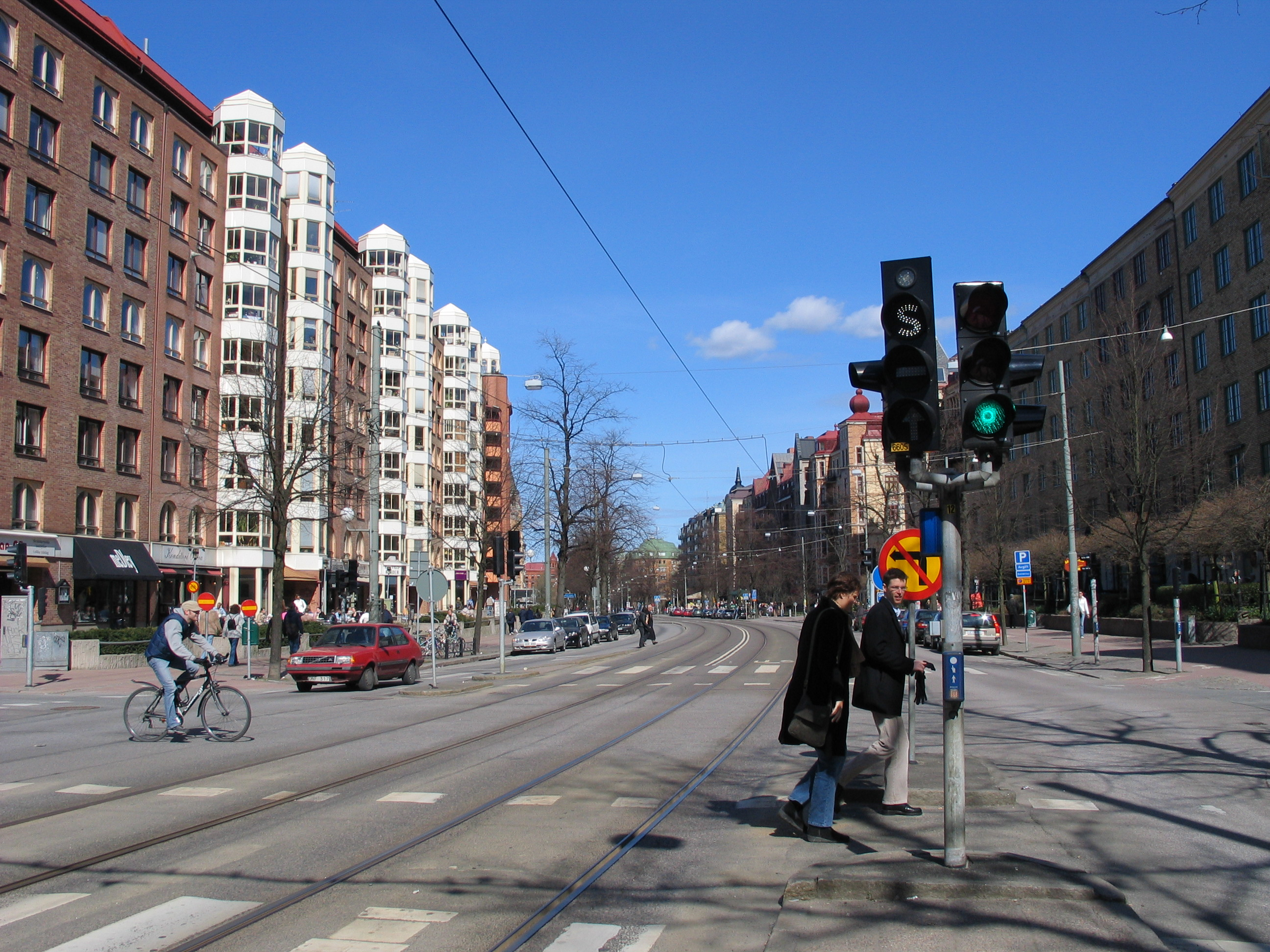 Linnegatan i Göteborg en tidig vårdag.